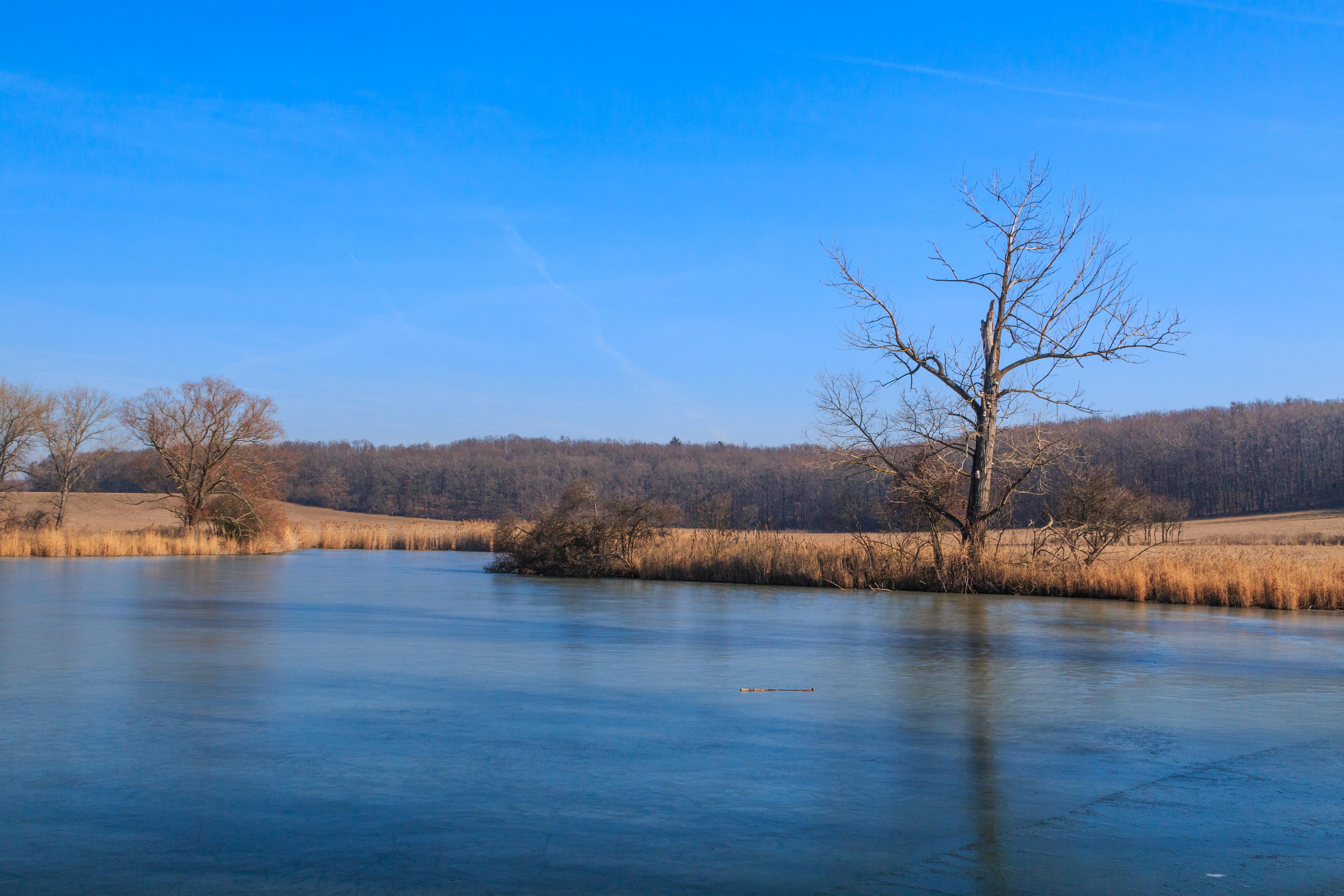 Pohled na rybník u trati z Rožďalovic Project: Vodstvo Ticket: 1711.